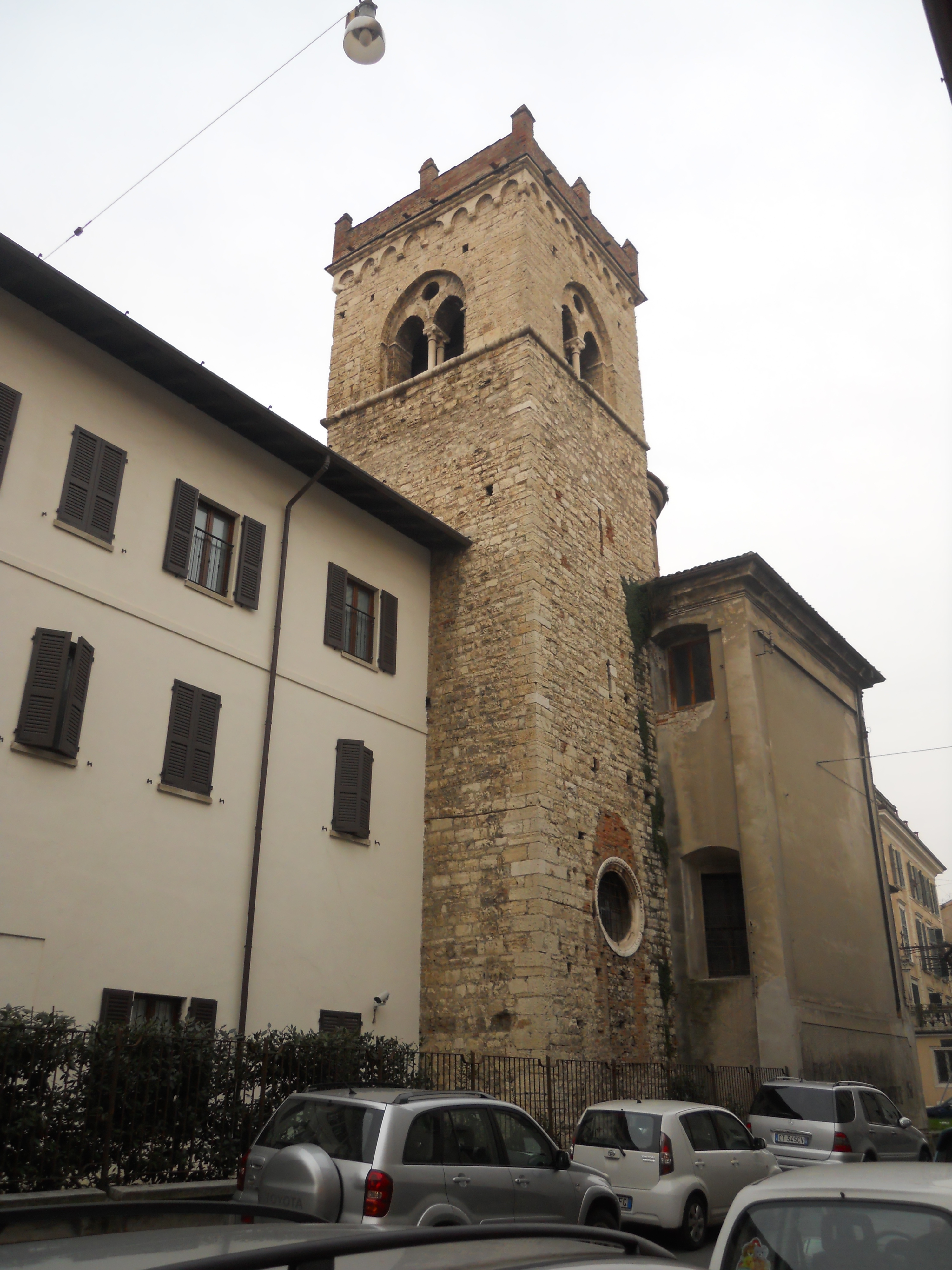 chiesa dei santi cosma e damiano (Brescia) campanile